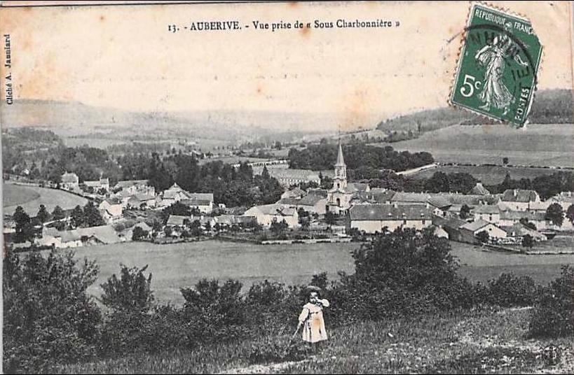 Carte postale du village vers 1910